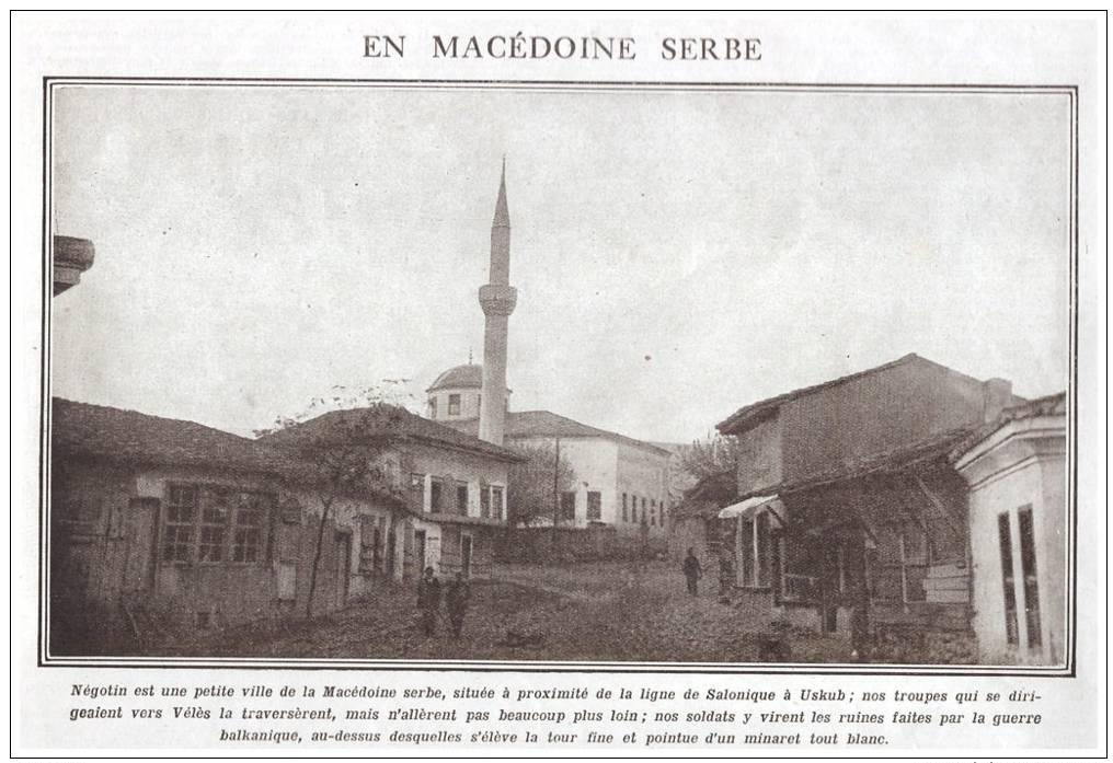 Неготино през Първата световна война.